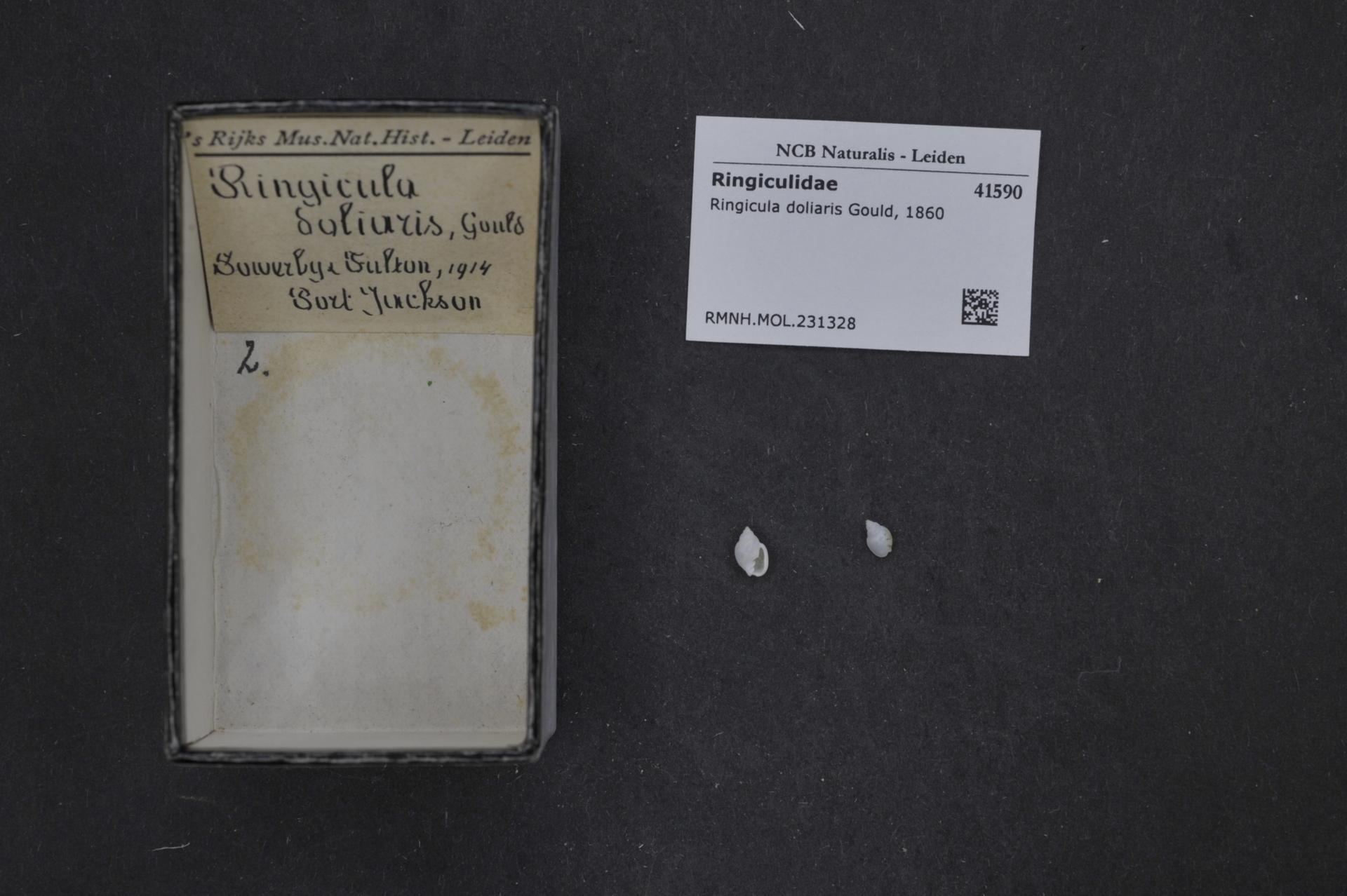 Ringicula doliaris Gould, 1860